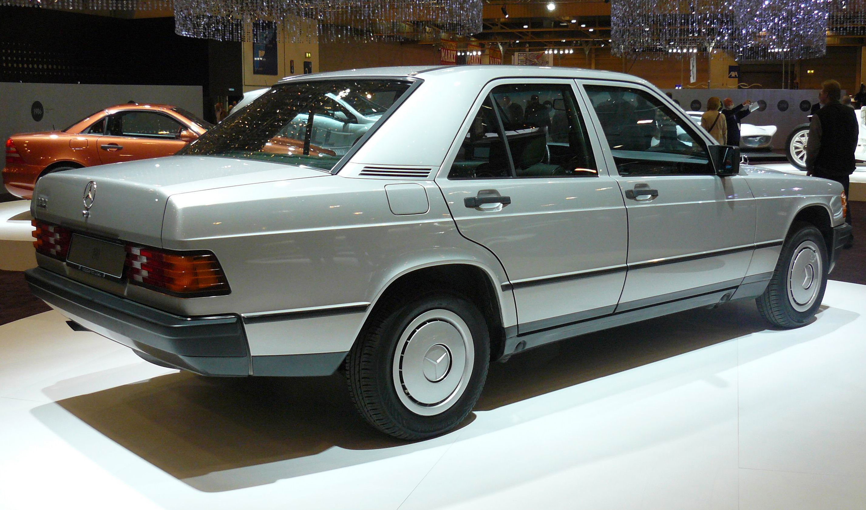 Essen 2011